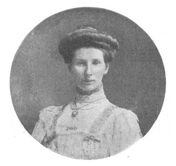 Марии Владимировне фон Эттер, ур. Клейнмихель (1872—1950)